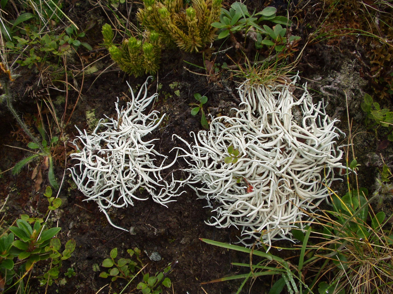 Totengebeinsflechte/Wurmflechte (Thamnolia vermicularis), Piedrosul, Rodna-Gebirge, Maramures, Rumänien